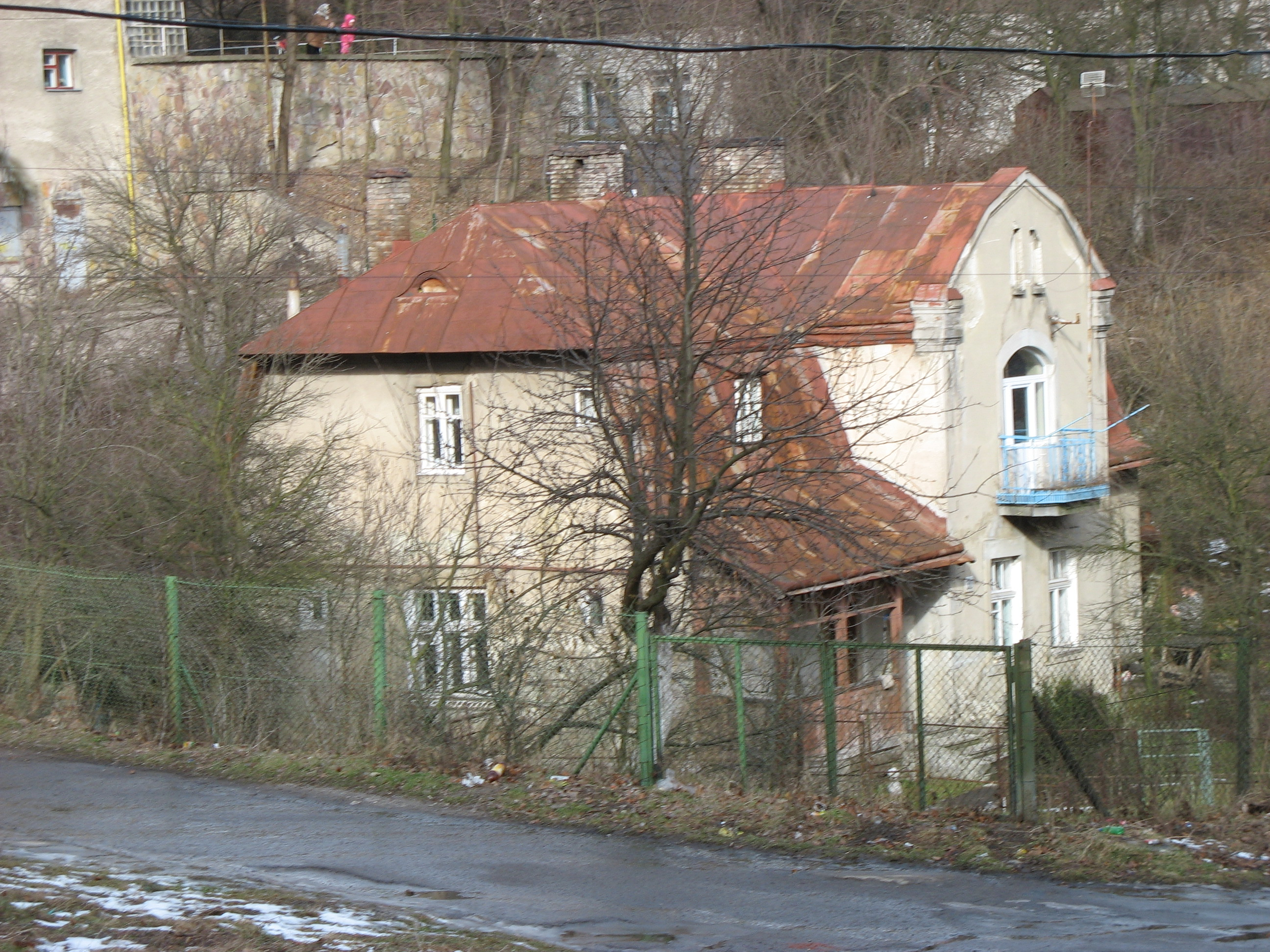 Втрачений будинок композитора Ярослава Вінцковського (Ярославенка) на вулиці Ярославенка, 30 у Львові.